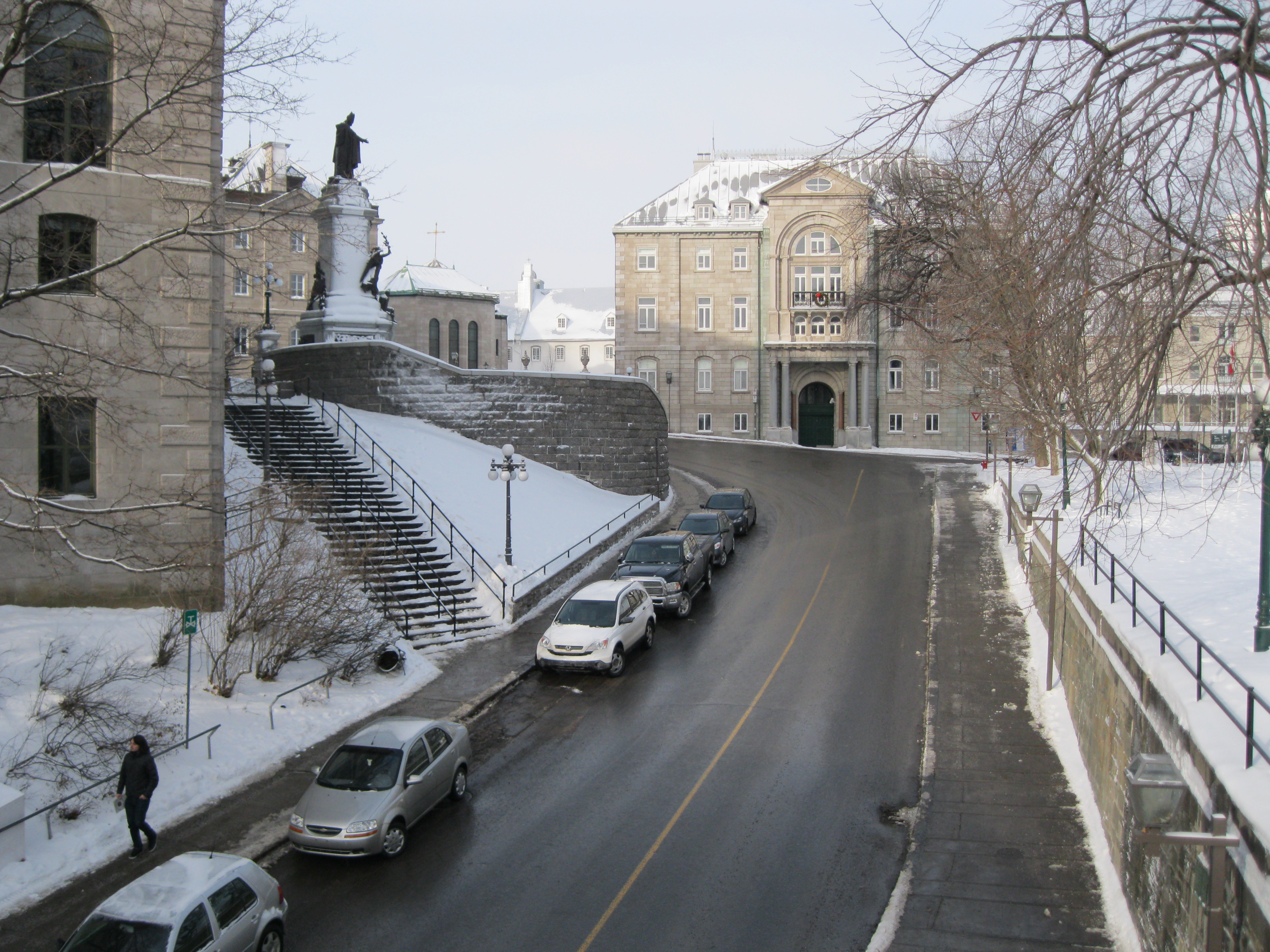 Côte de la Montagne, vue de la porte Prescott, Vieux-Québec. Au centre, l'archevêché. *